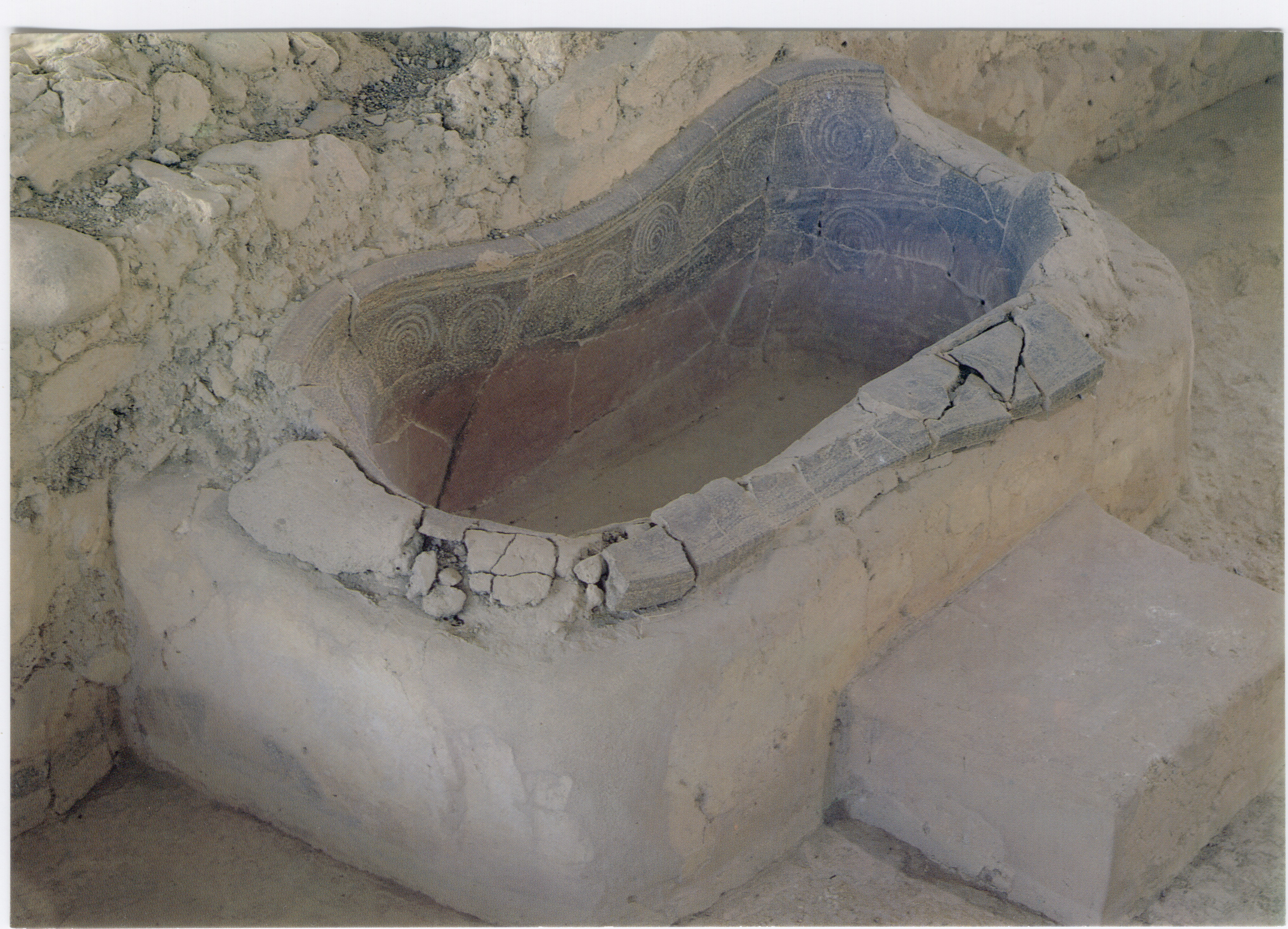 Pilo di Messenia - Palazzo di Nestore - Bagno della Regina